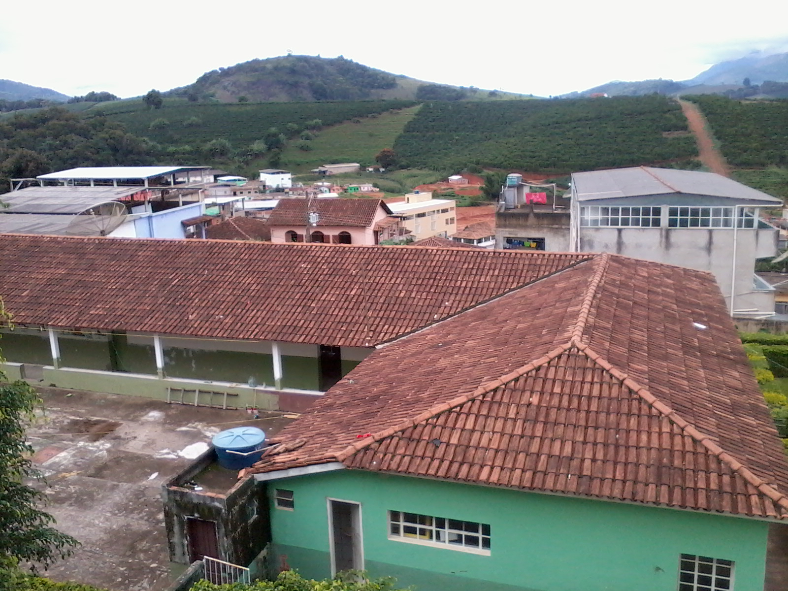 Centro de São João do Manhuaçu, com Creche Municipal em destaque.